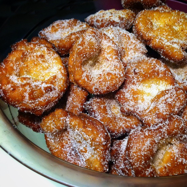 Brunyols de l'Empordà, es caracteritzen per no tenir un forat. Extret de la Piràmide d'aliments de l'Empordà